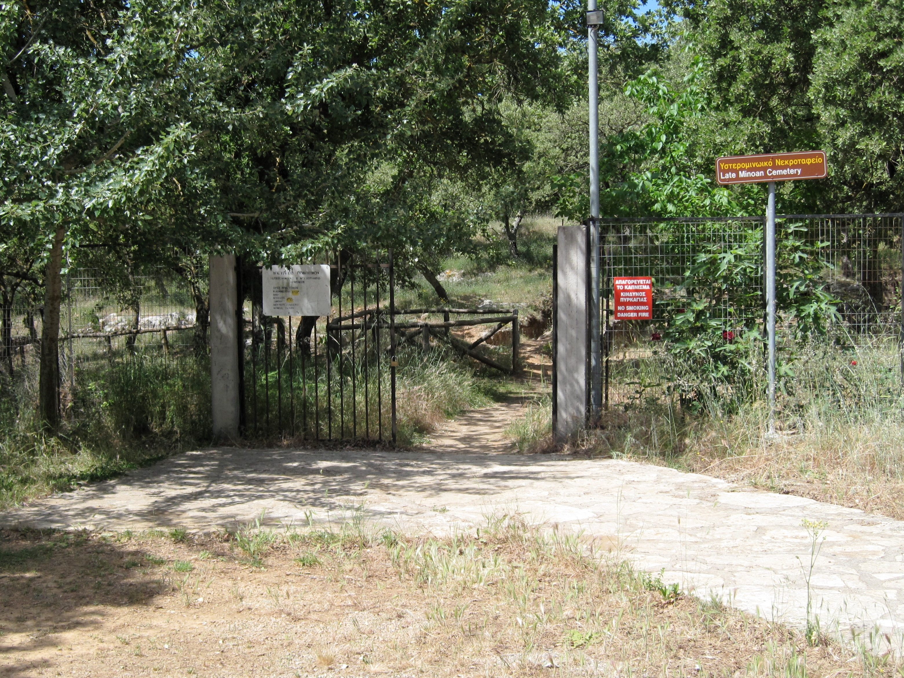 Eingangstor zum spätminoischen Friedhof von Armeni, Präfektur Rethymno, Kreta, Griechenland